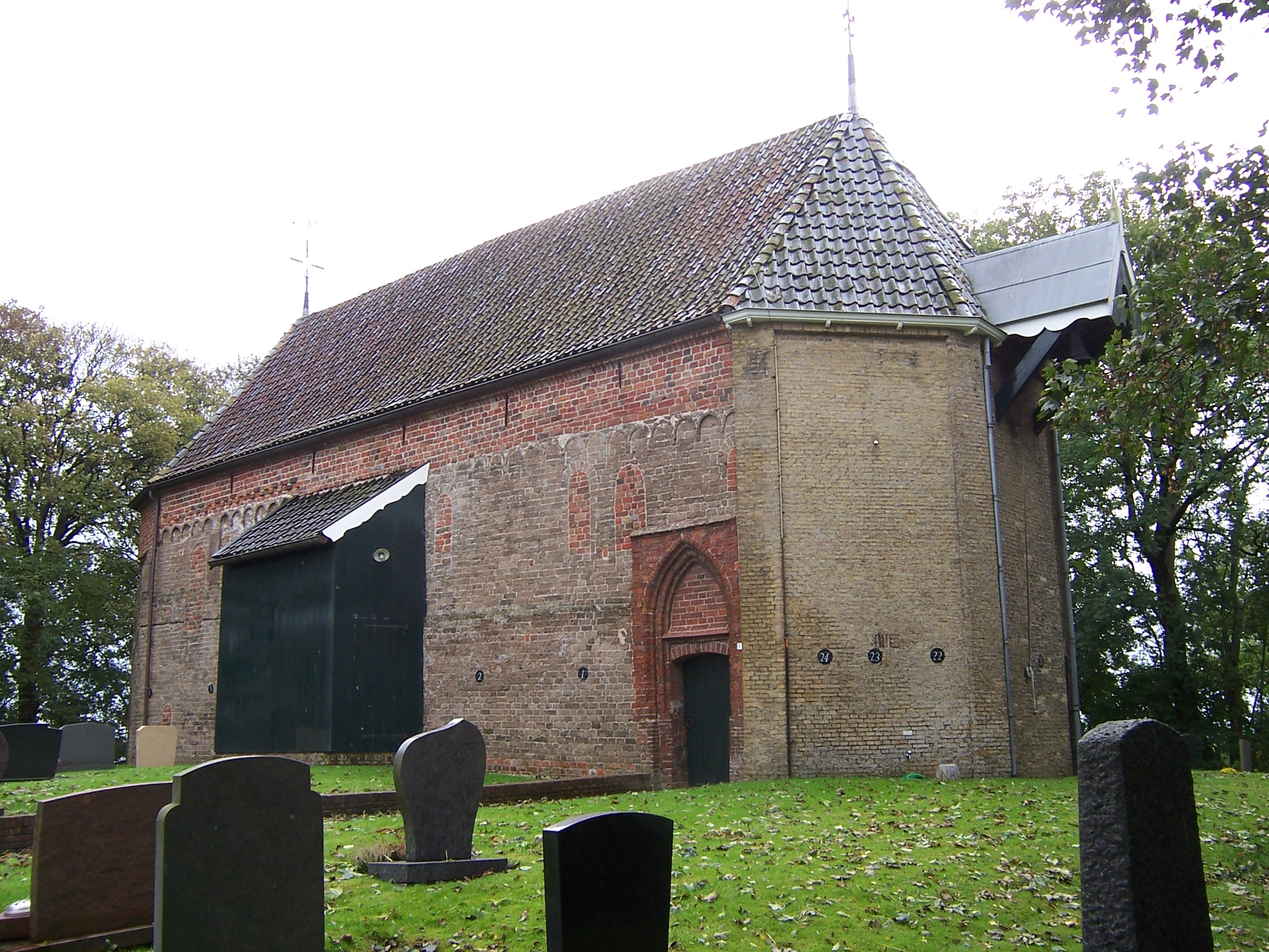 Kerk Wetsens Noordmuur